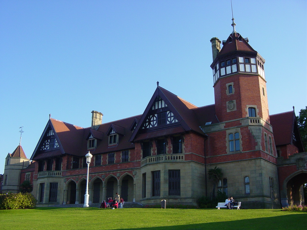 Palacio de Miramar, en San Sebastián (España)